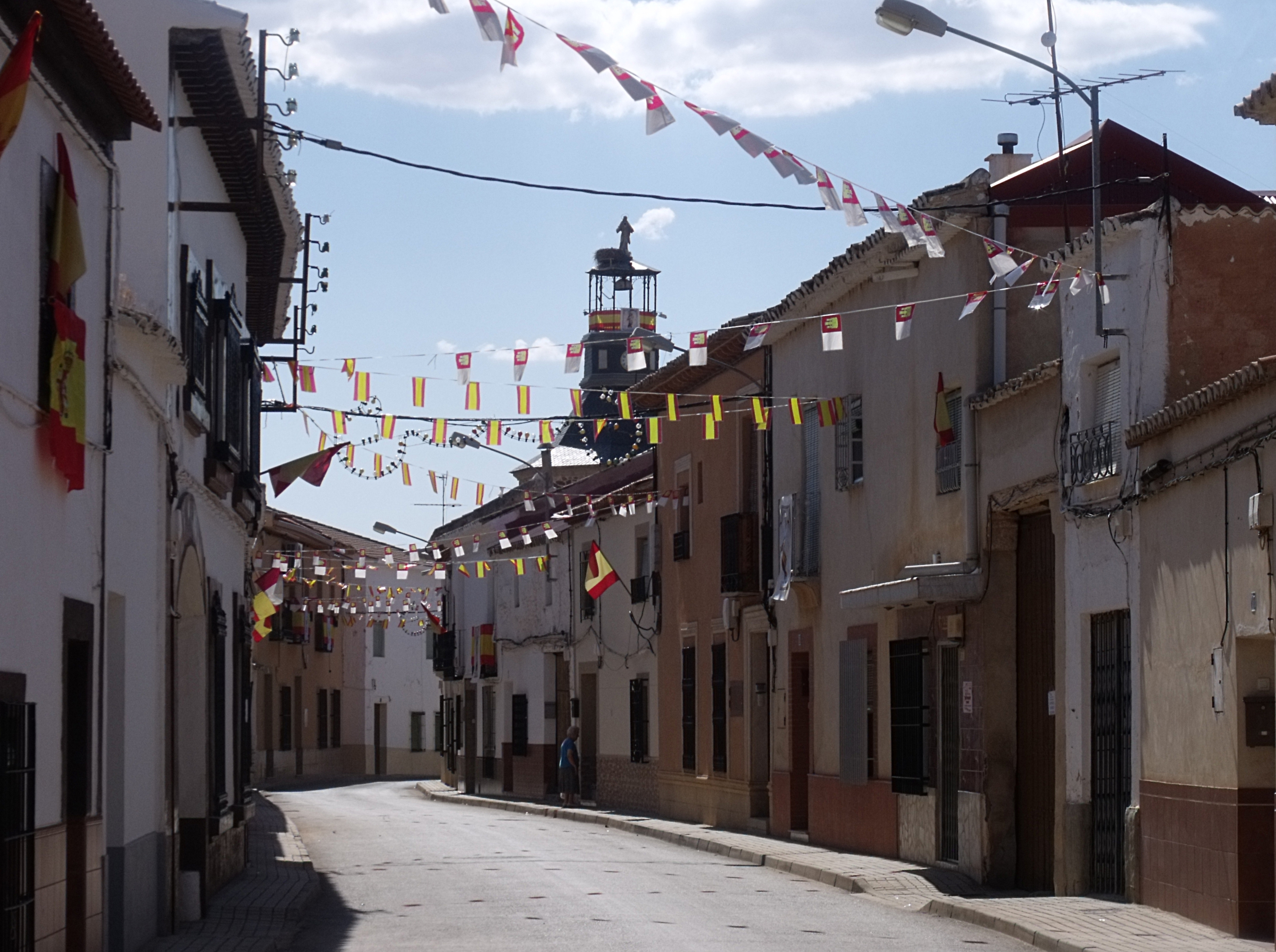 Alcubillas